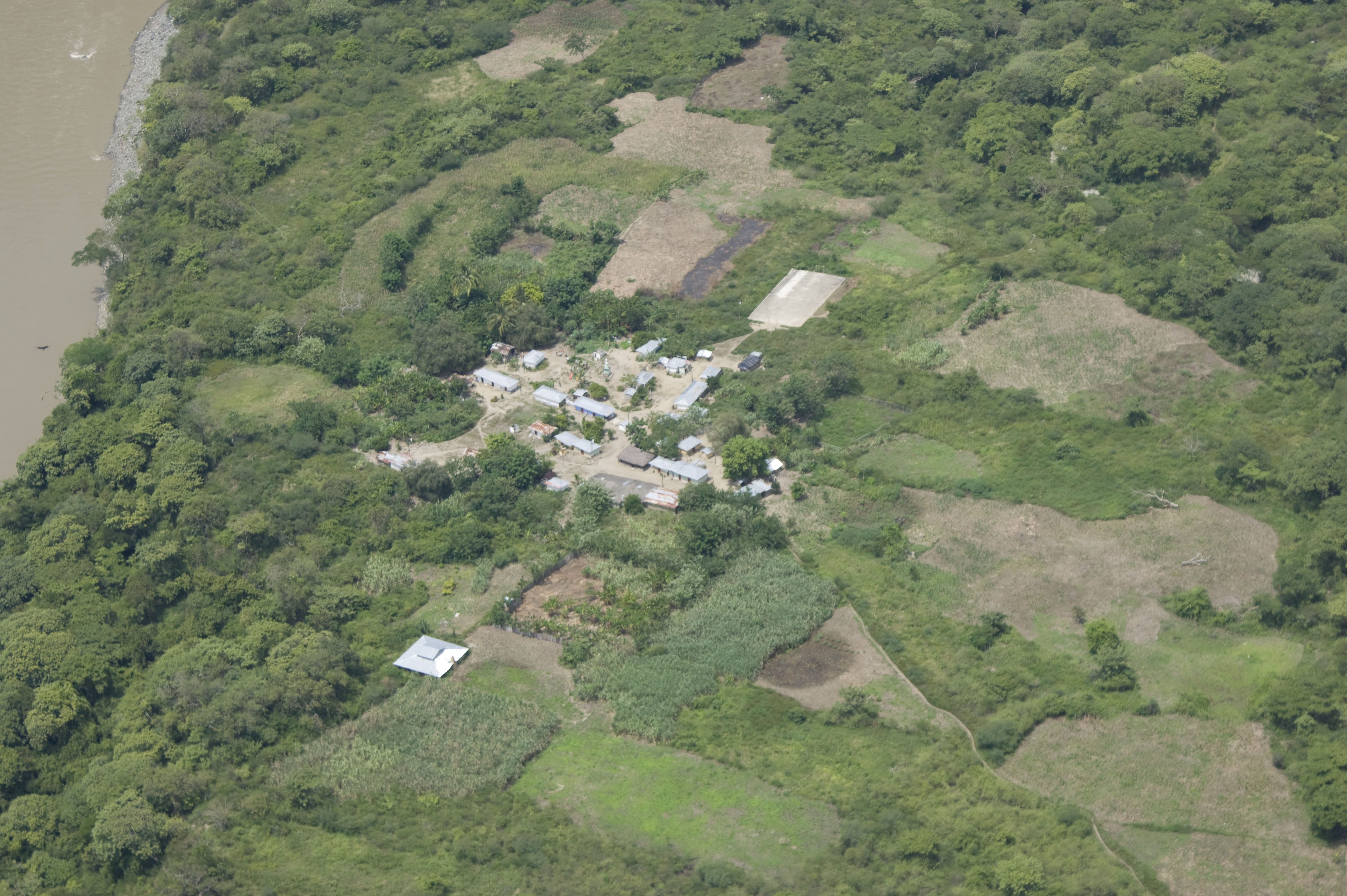 Orobajo, Sabanalarga, en el departamento de Antioquia, donde se ejecutan las obras de Hidroituango.